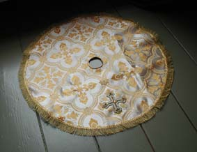 zelf gemaakt